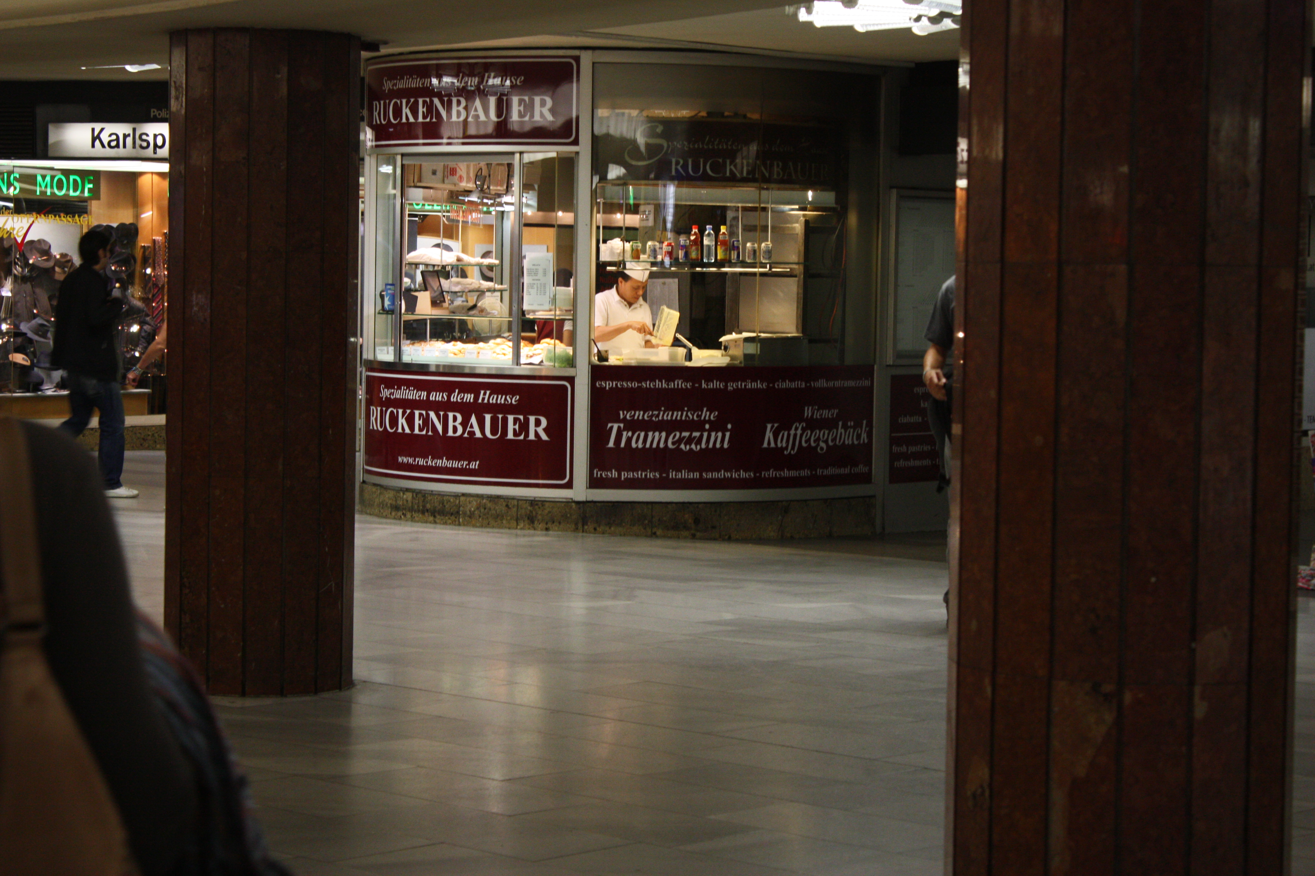 Tramezzini, Wien, Vienna